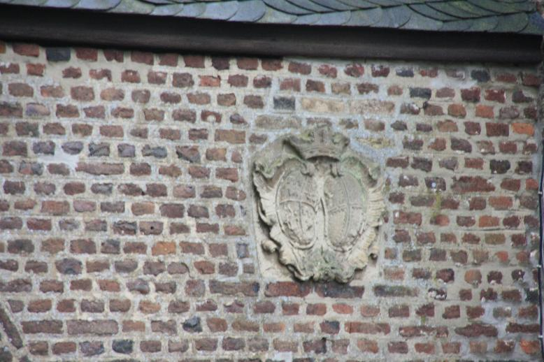 Das Wappen von Franz Joseph Graf von Metternich am Torbogen des Trompeterhofes in Nörvenich